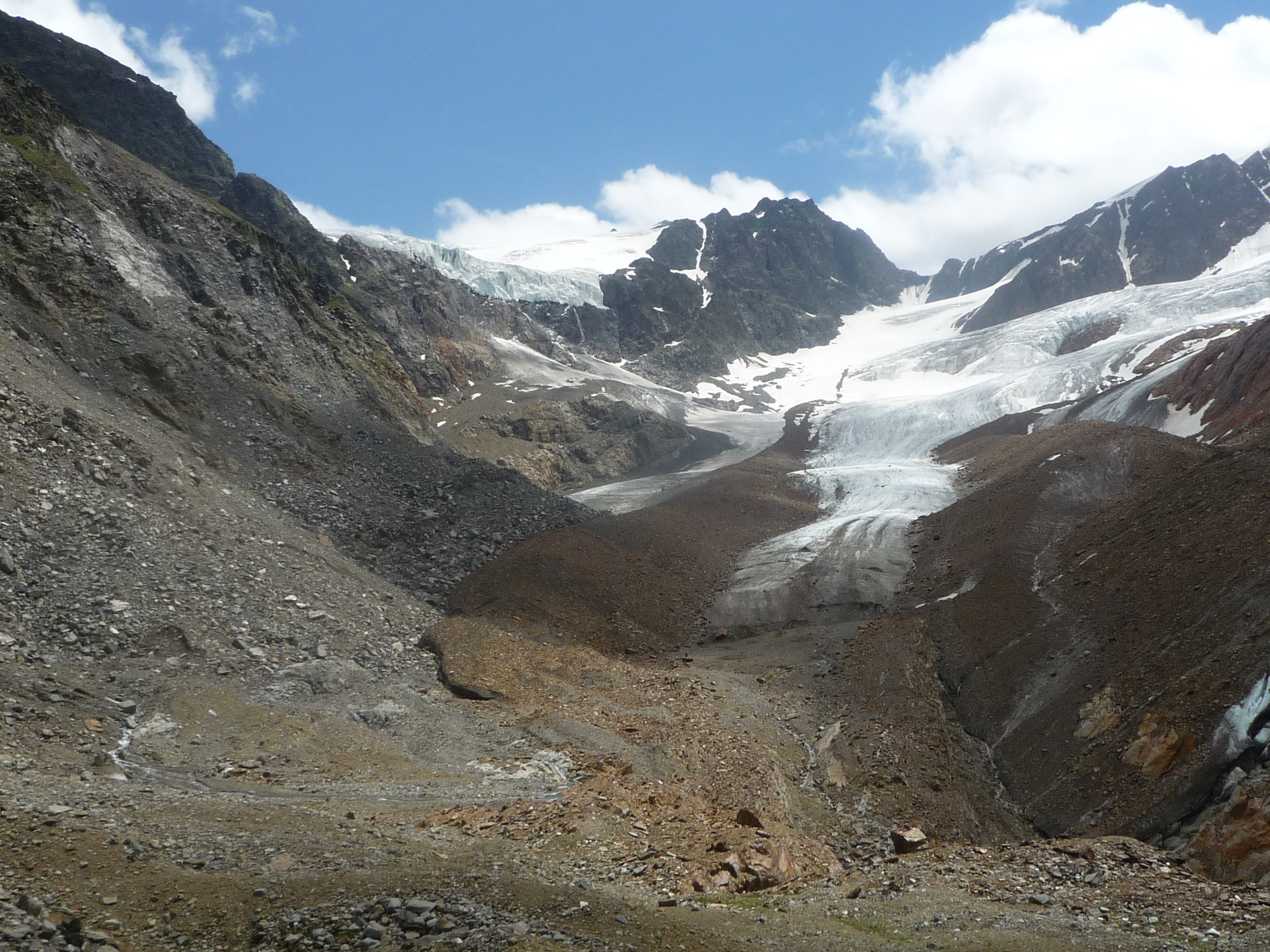 Links die Eisbrüche zwischen Langtauferer und Vernagt Wänden und dahinter der Gepatschferner